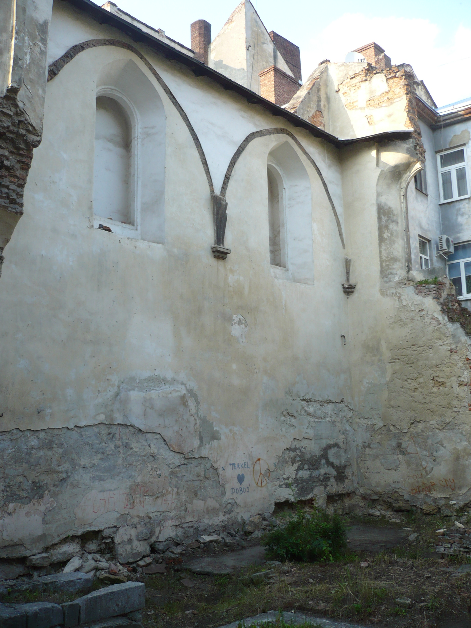 Lwów. Synagoga Złota Roża